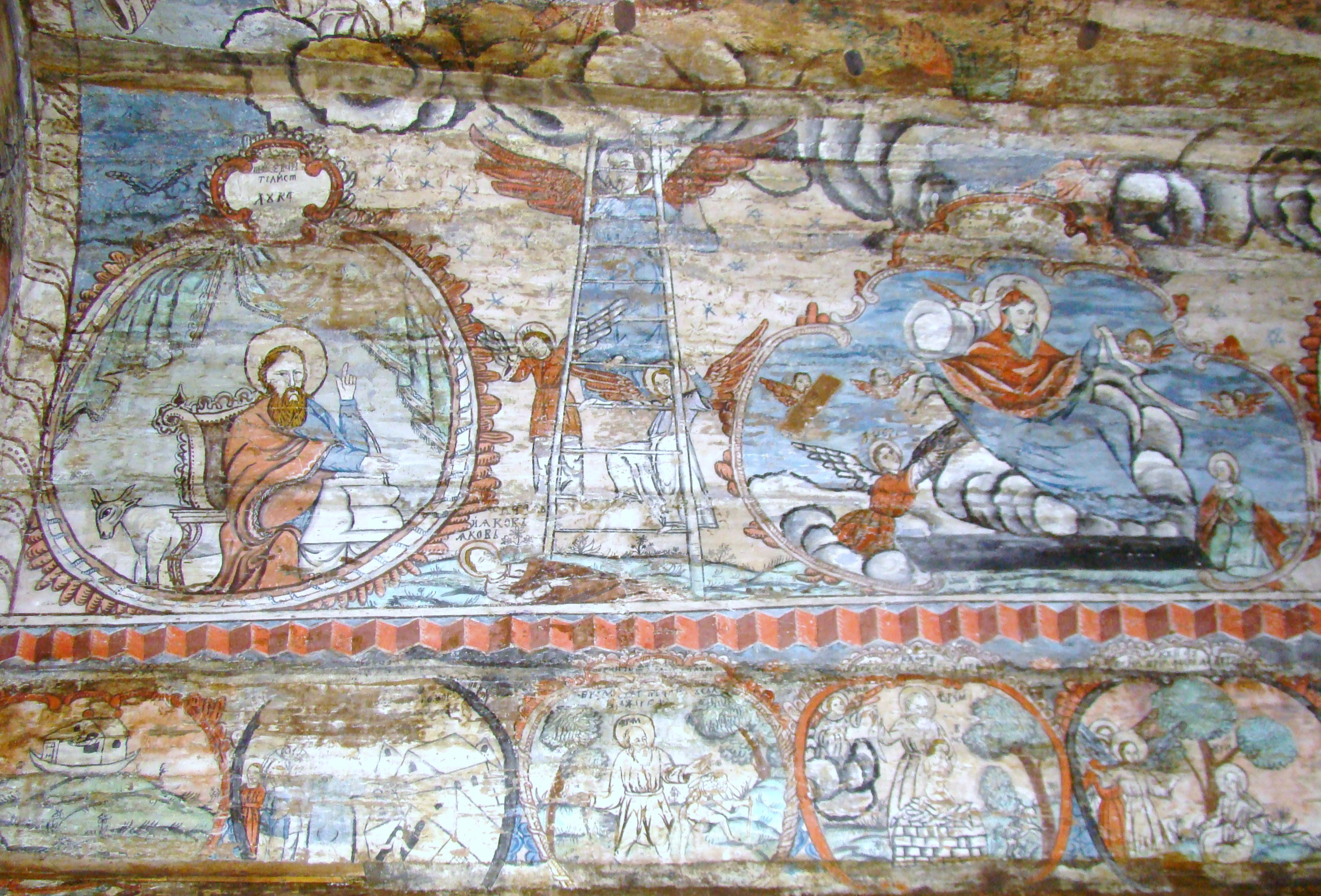 Biserica de lemn "Intrarea Maicii Domnului în Biserică" , sat BÂRSANA